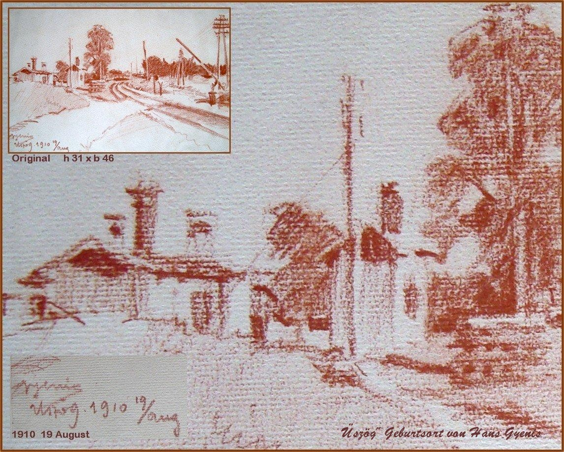 Aquarell von Hans Gyenis, "Die Dascha an der Bahnline" gemalt am 19. Aug. 1910 in Üszög, dem Geburtsort von Hans Gyenis